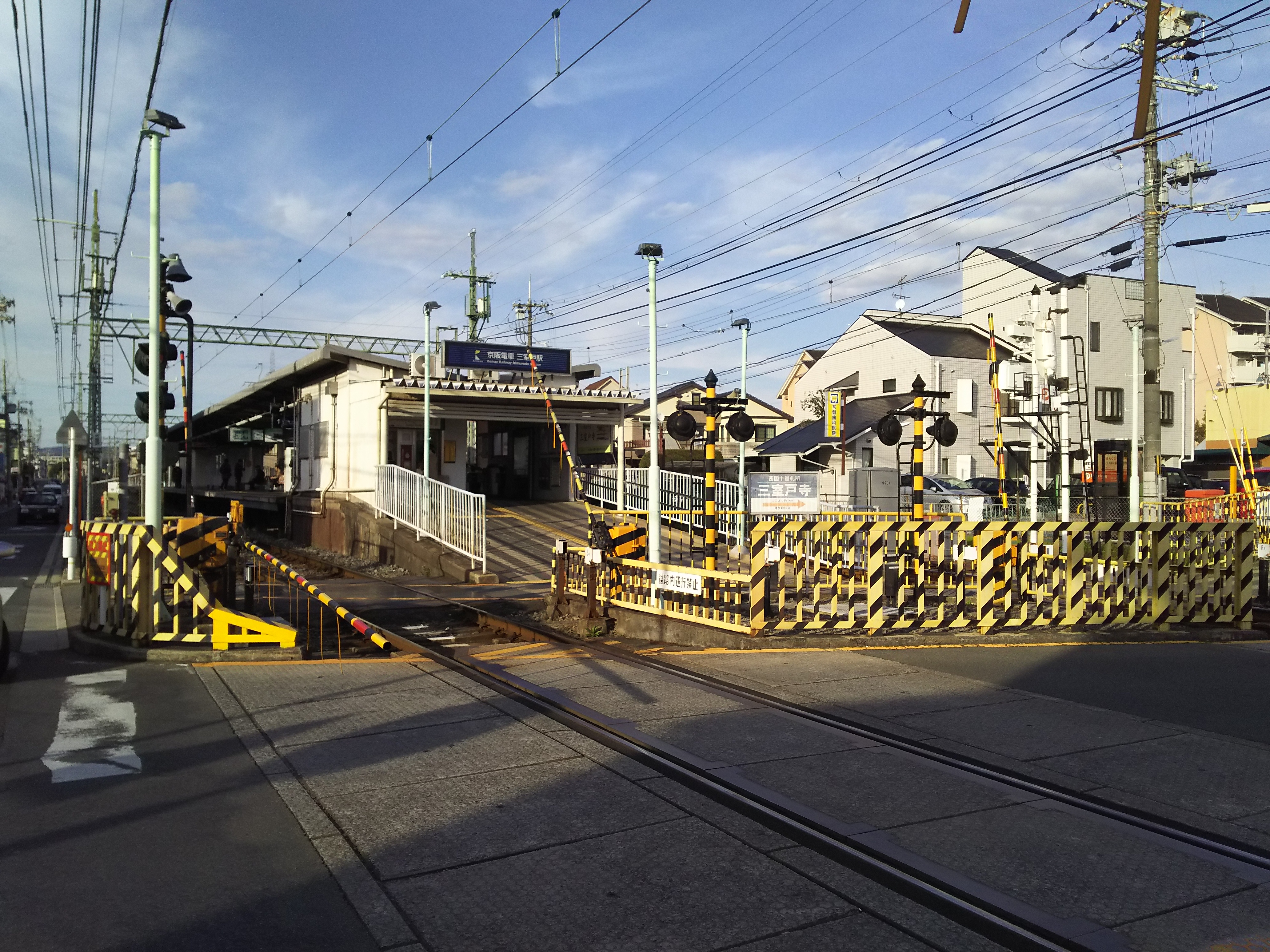 京阪宇治線三室戸駅遠景（京都府宇治市）